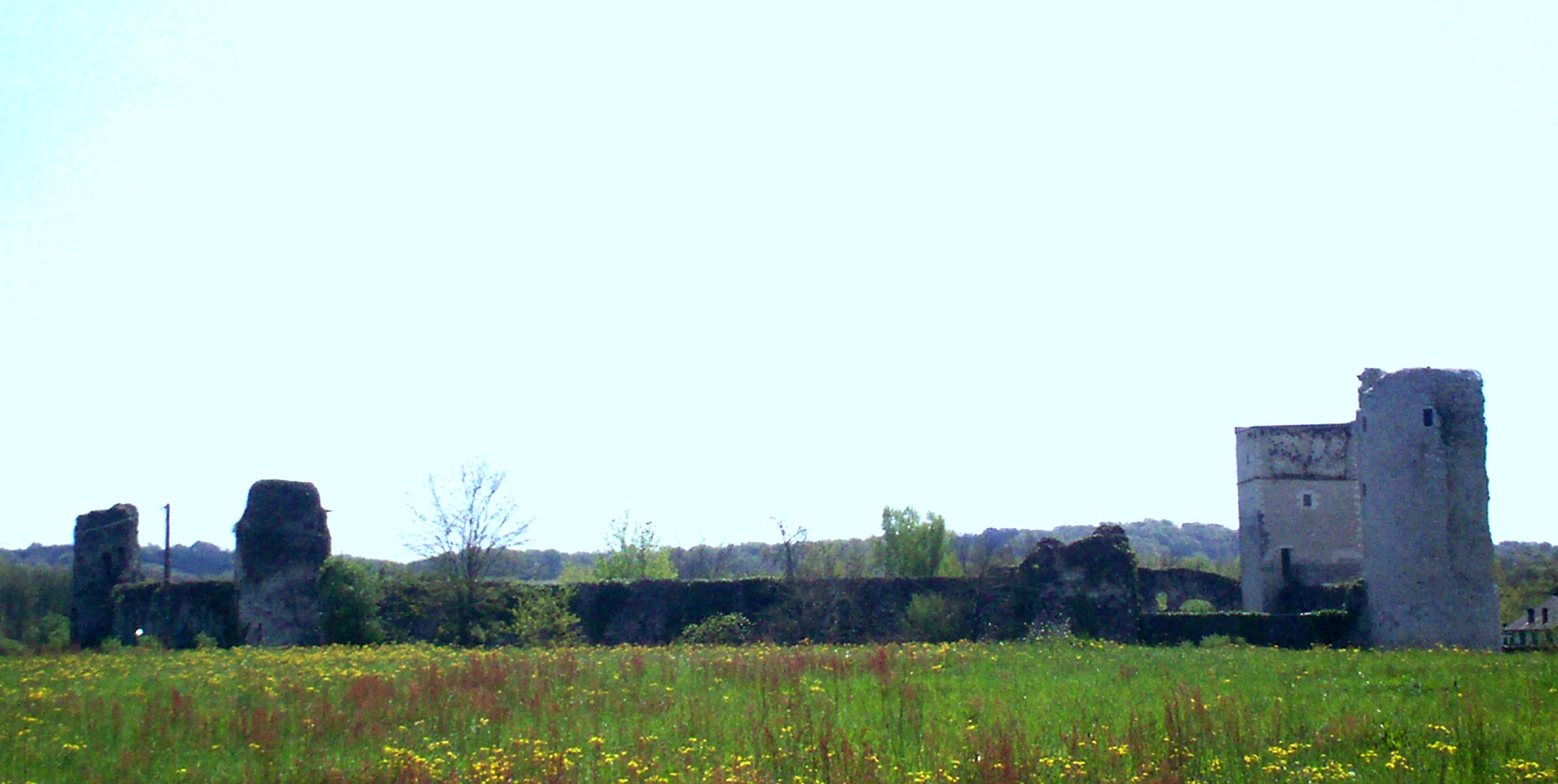 Runa Simi: fotografia personal que ya puse en la pagina en occitano